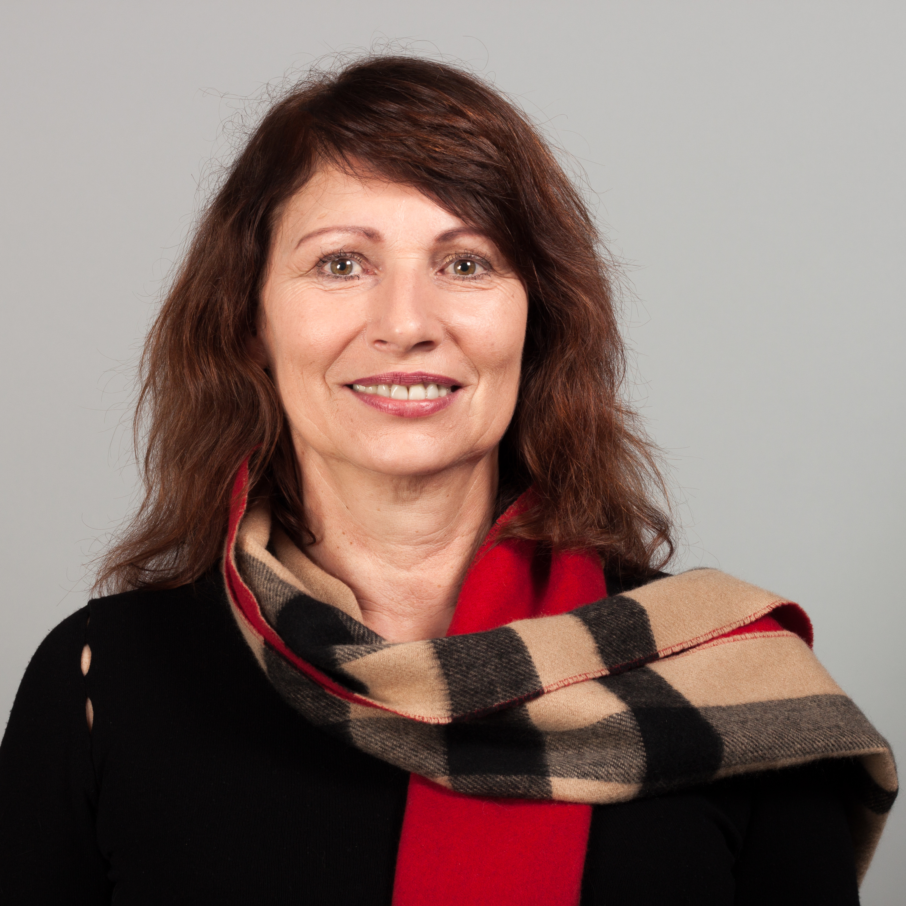 Abgeordnete des Sächsischen Landtages Petra Köpping